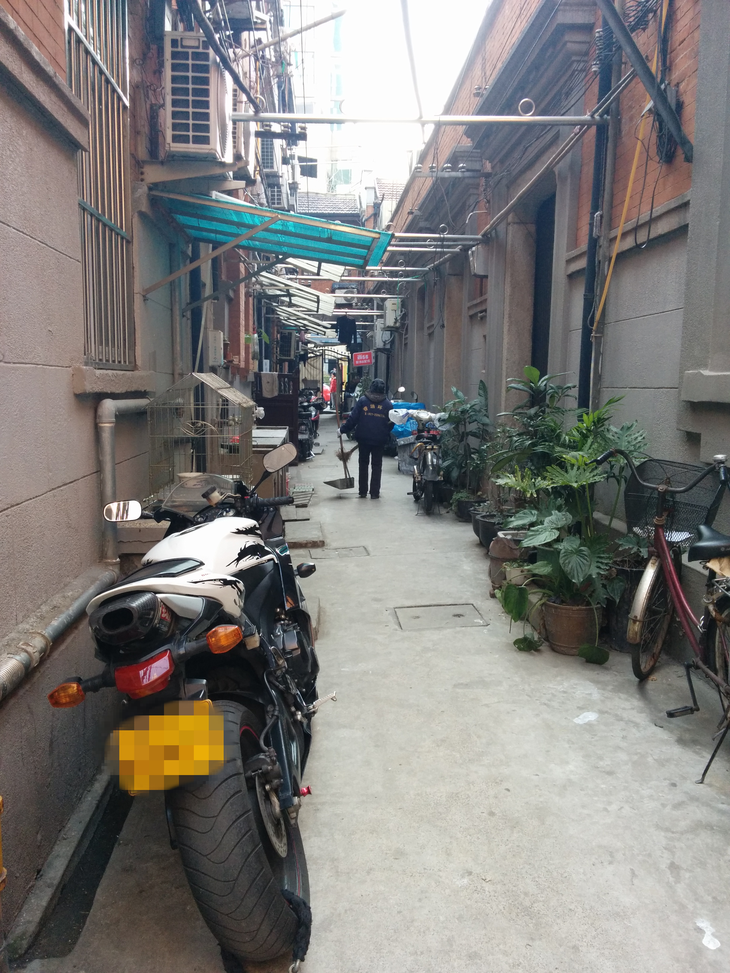 中文（中国大陆）: 尚贤坊支弄